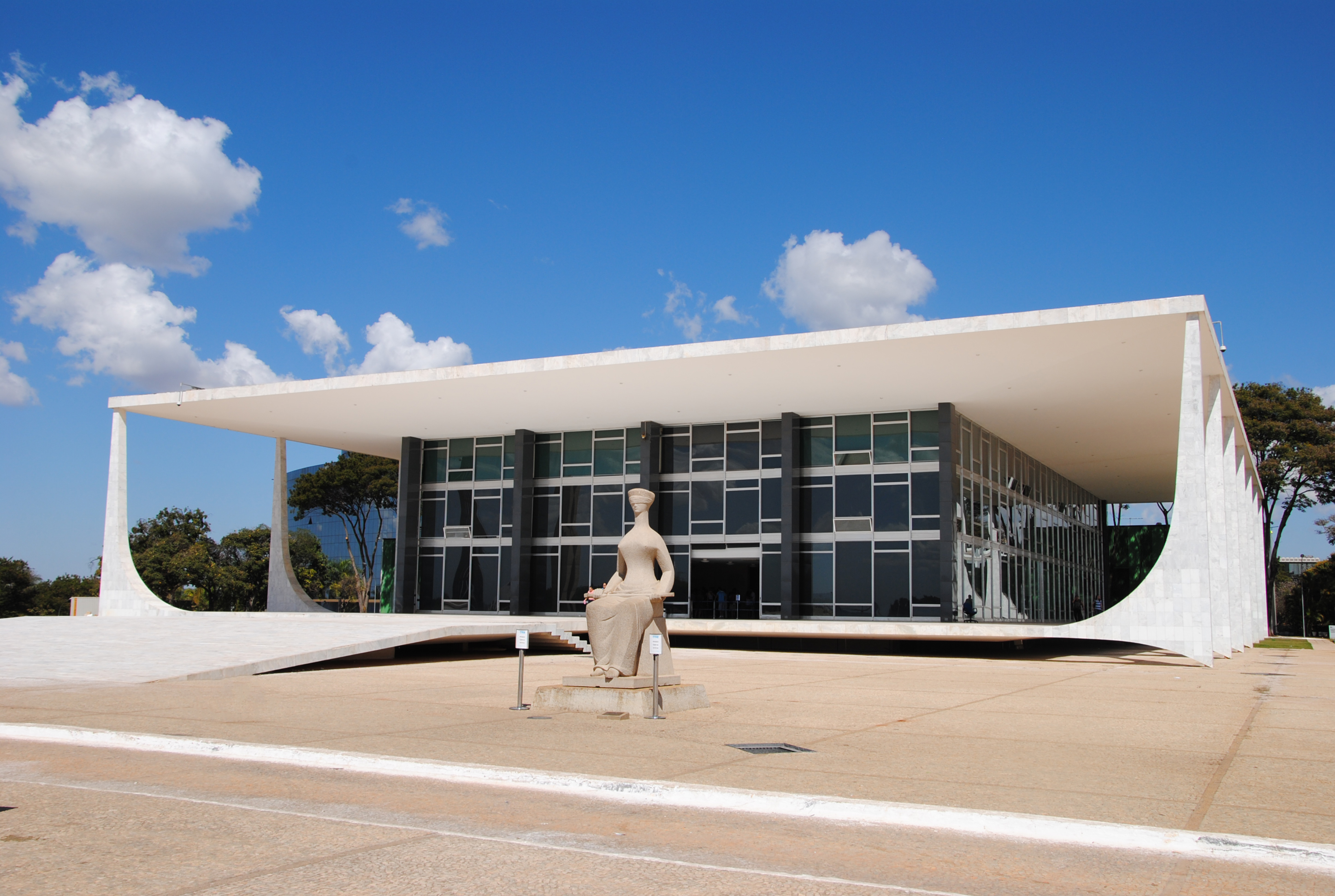 Sede do Supremo Tribunal Federal em Brasília, Distrito Federal, Brasil.